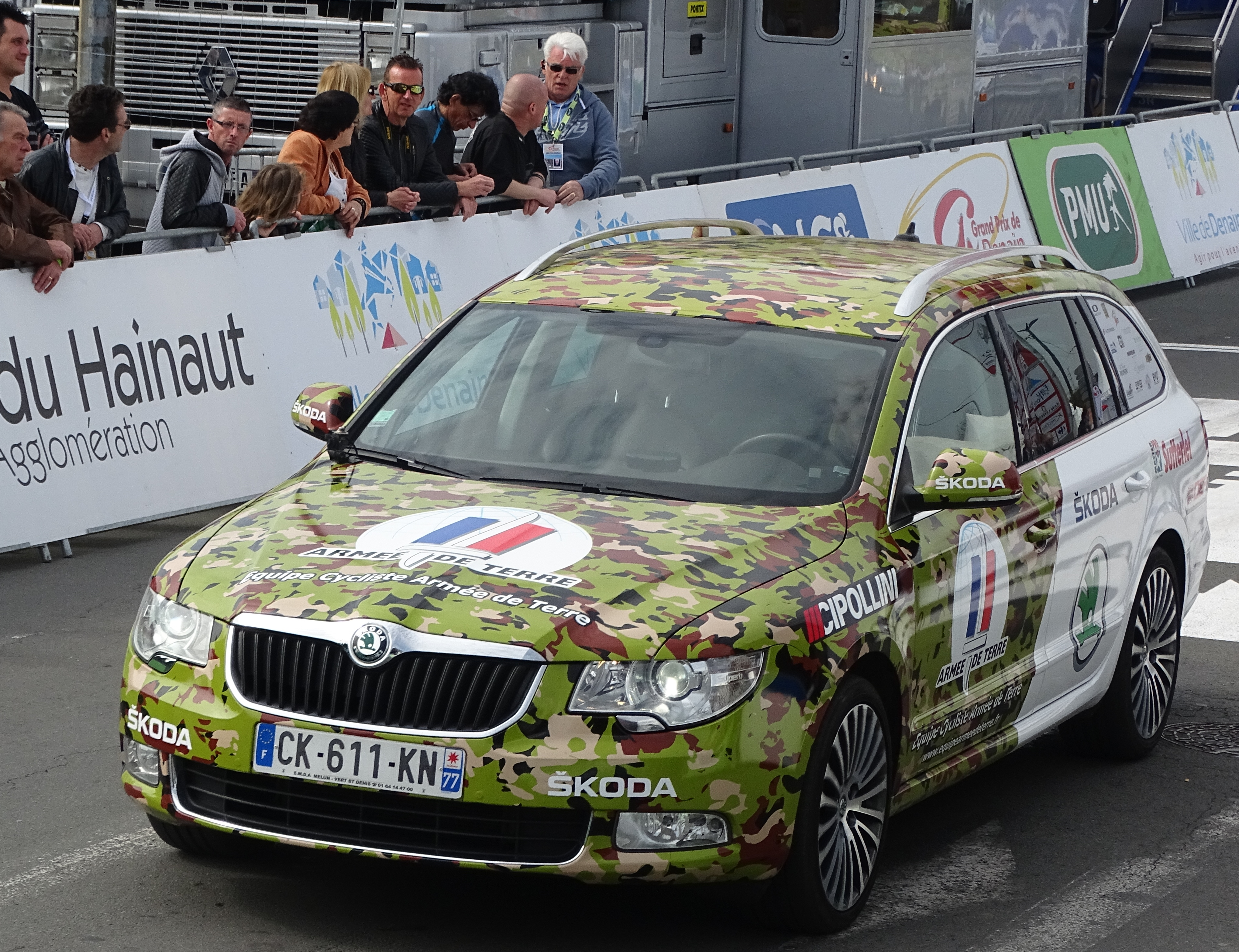 Reportage réalisé le jeudi 16 avril à l'occasion du départ et de l'arrivée du Grand Prix de Denain 2015 à Denain, Nord, Nord-Pas-de-Calais, France.